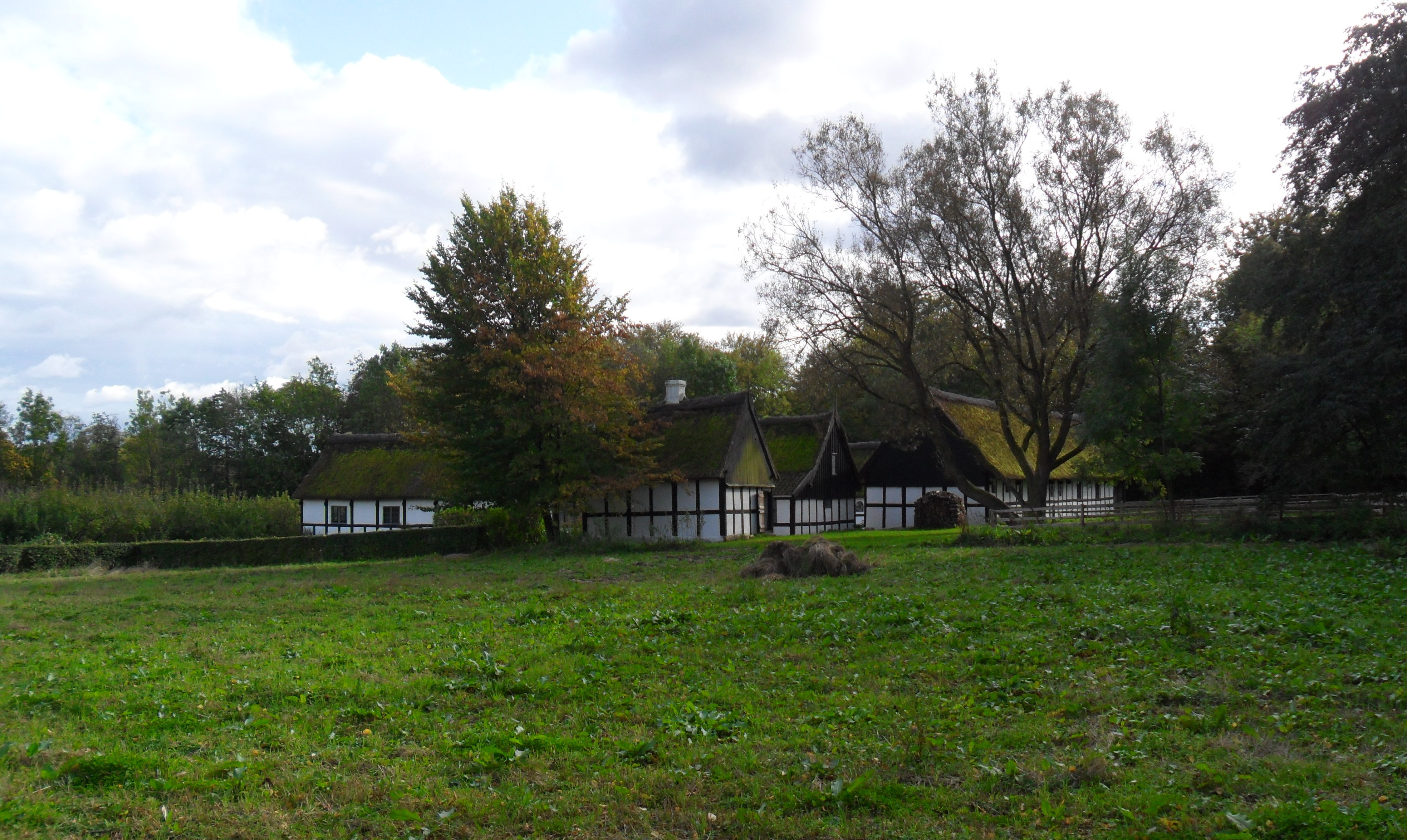 Gården fra Øster Larsker, Bornholm